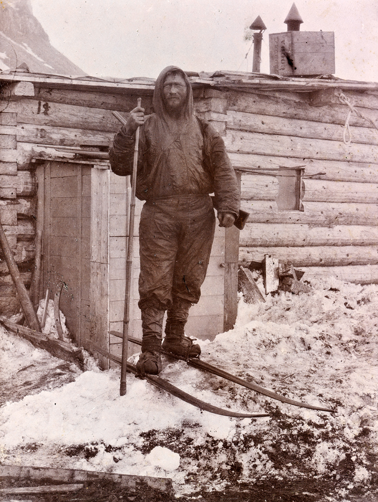 Tittel / Title: Portrett av Fredrik Hjalmar Johansen Motiv / Motif: Fredrik Hjalmar Johansen på ski utenfor F. Jacksons hytte i Elmwood. Slik så han ut da han traff F. Jackson den første dagen. Ett av bildene fra ekspedisjonen med polarskipet Fram mot Nordpolen i perioden 24 juni 1893 til 13 august 1896. Etter planen skulle skipet drive i isen med havstrømmer fra Sibirkysten over Nordpolen mot Grønland. I mars 1895 foretok Fridtjof Nansen sammen med en ledsager en hasardiøs skiferd med hundesleder i forsøket på å komme til polpunktet. Dato / Date: 17. juni 1896 Fotograf / Photographer: Frederick Jackson (1860-1938) Sted / Place: Russland, Frans Josefs Land, Kap Flora Eier / Owner Institution: Nasjonalbiblioteket / National Library of Norway Lenke / Link: Bildesignatur / Image Number: no-nb_bldsa_3c111